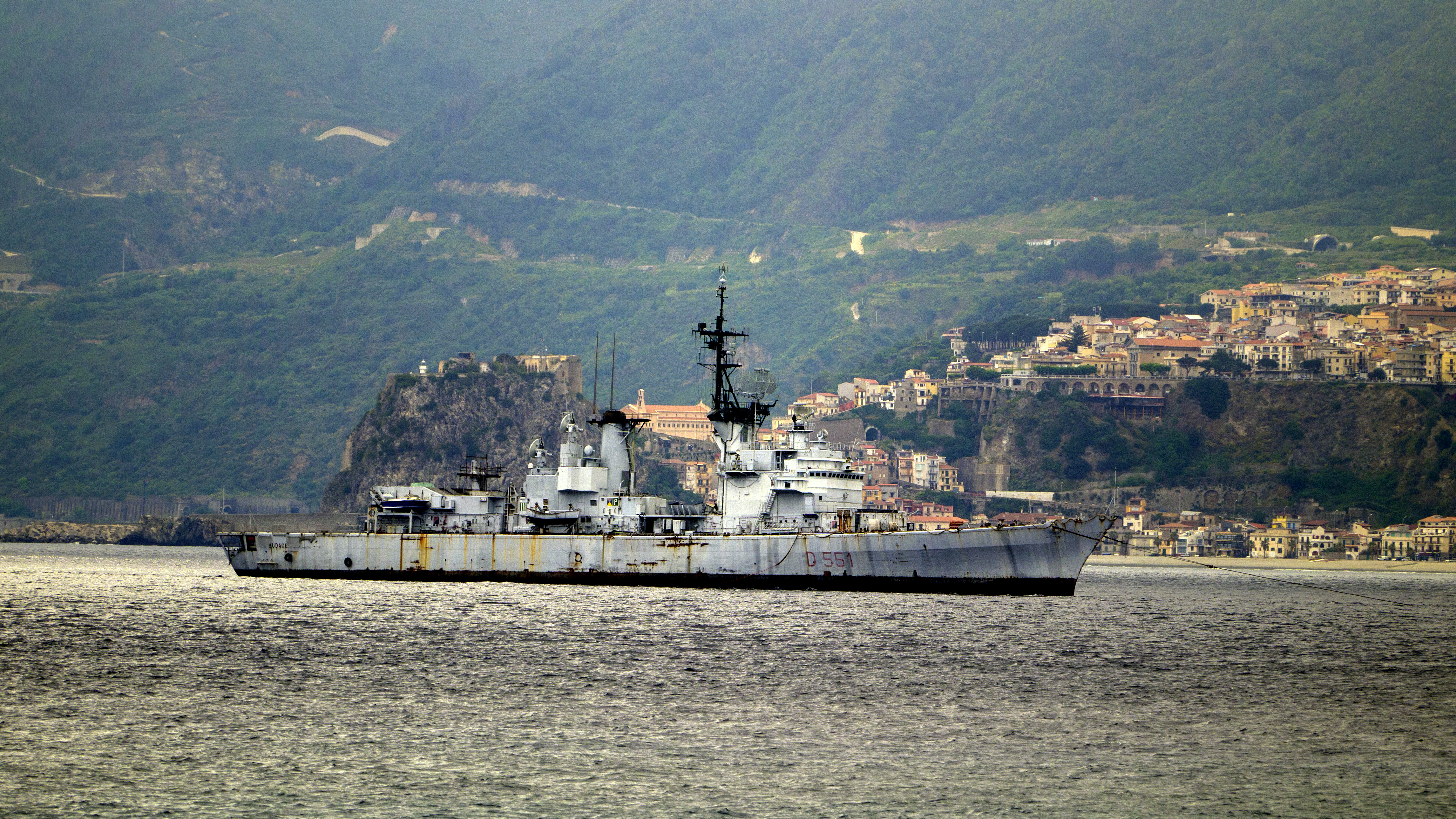 8 maggio 2018 - Il cacciatorpediniere Audace, trainato dal rimorchiatore Marcandrea, transita nello Stretto di Messina diretto ad Aliaga dove, come il gemello Ardito, verrà demolito.